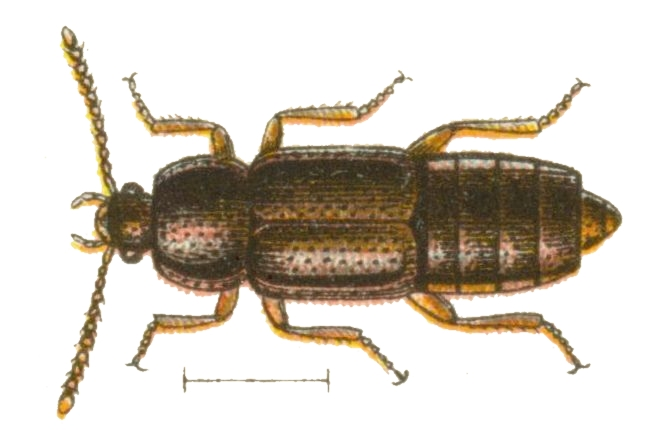 Acidota crenata